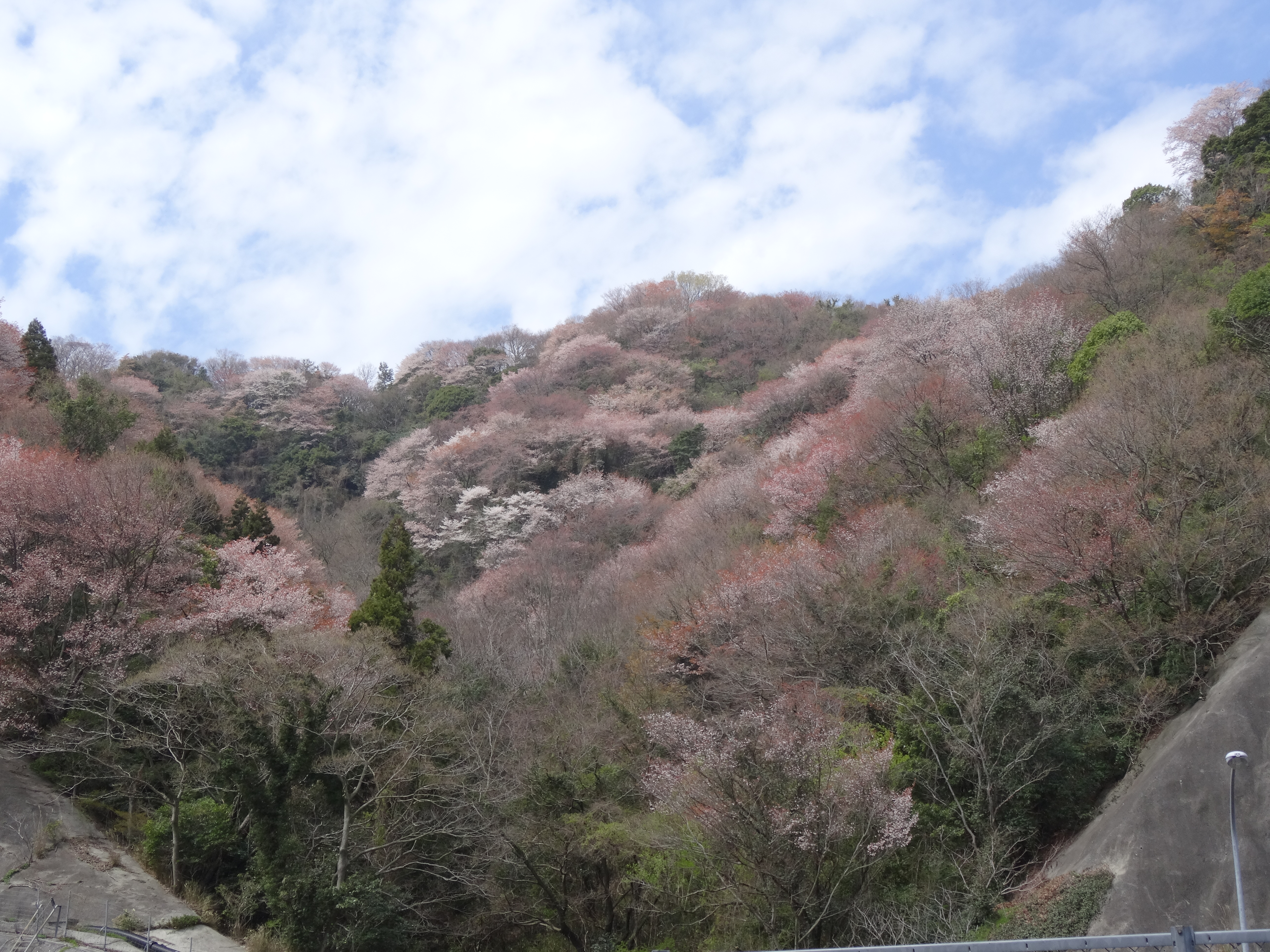 満開の雄ノ山峠の山桜